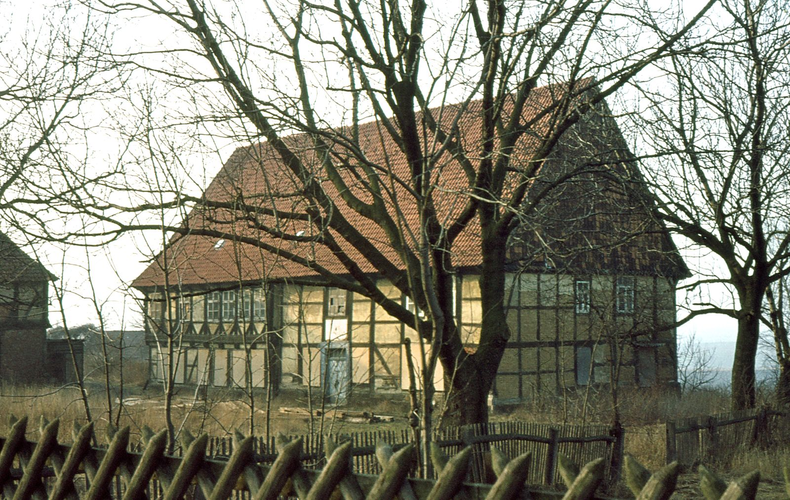 Wohngebäude des Garßenhof in Salzgitter-Gitter, Ansicht von Südosten. Das Gebäude wurde 1980-82 nach Salzgitter-Bad umgesetzt.